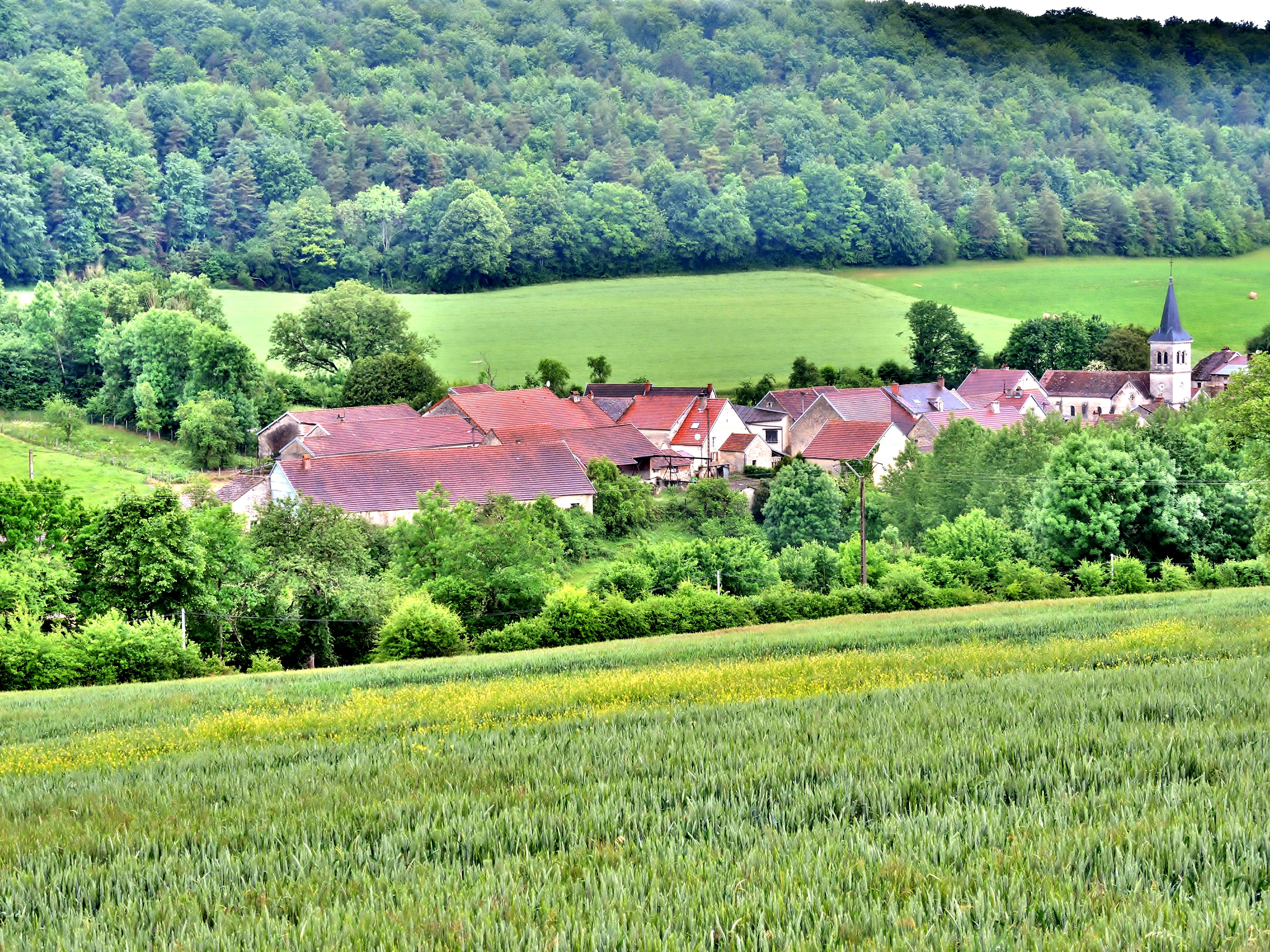 Panorama sur le village de Germaines. Haute-Marne.